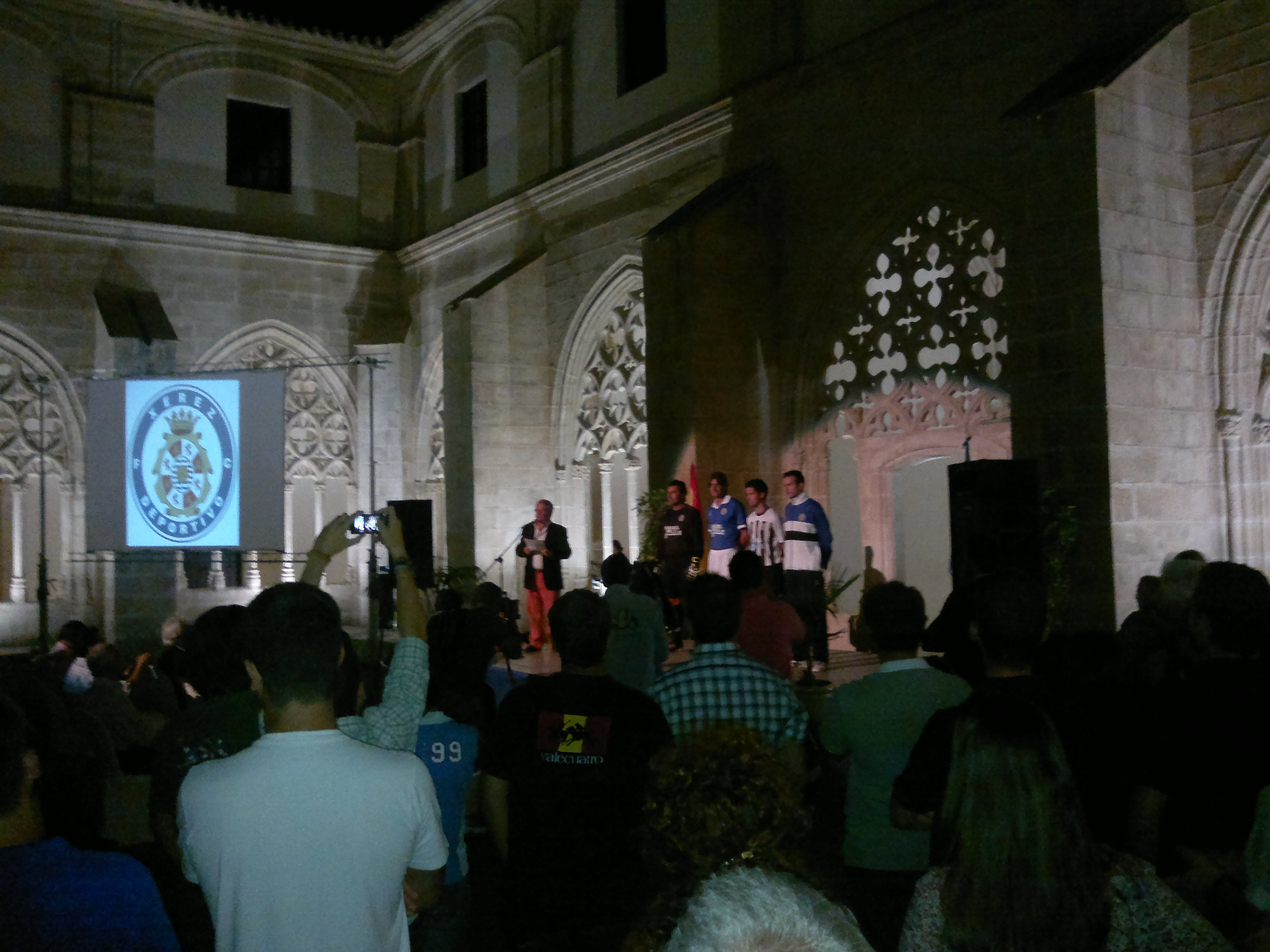 Xerez kit presentation (2014-15 season)